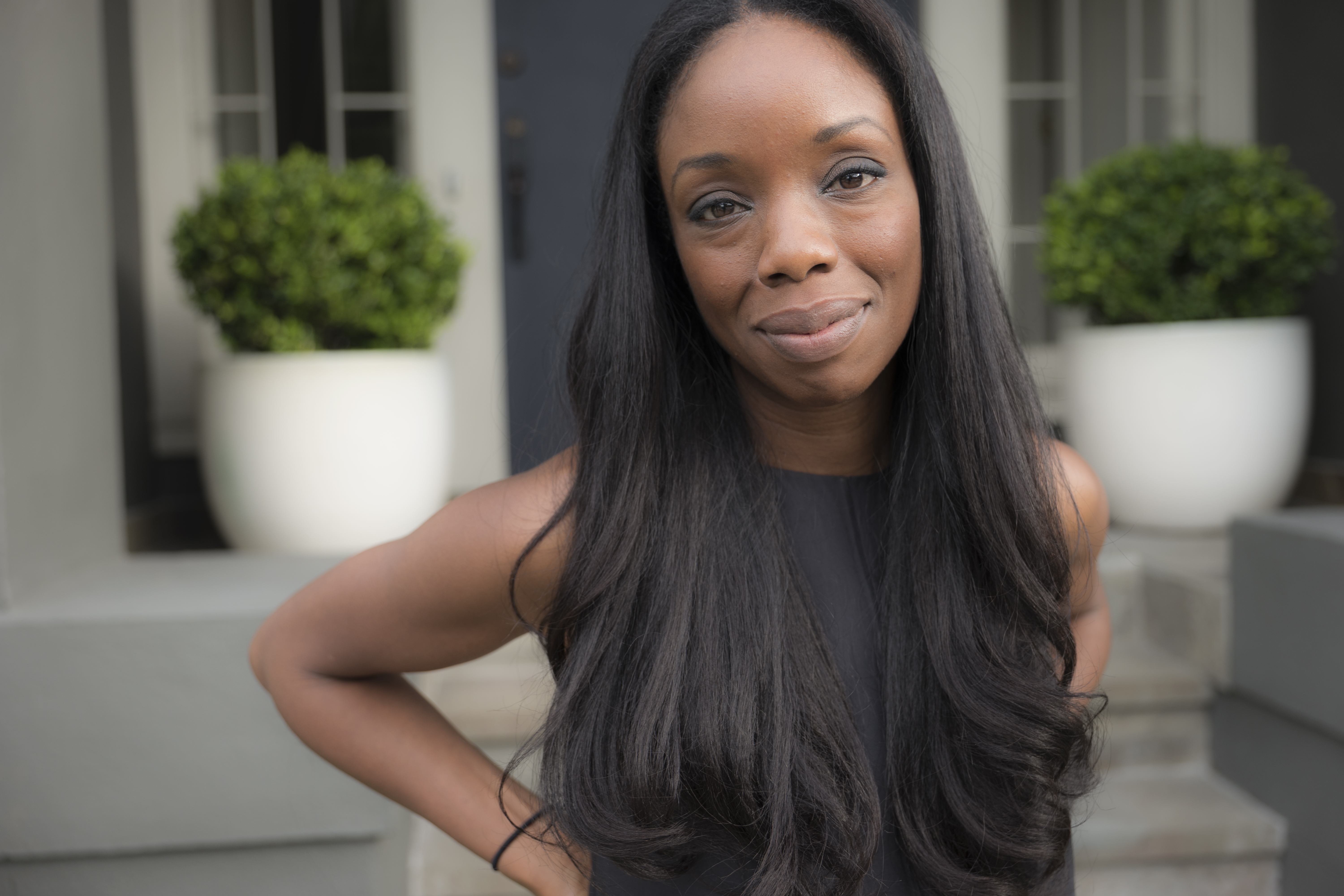 Nadine Burke Harris in 2017.